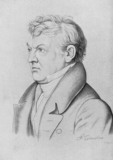 Sulpiz Boisserée, Steindruck, Sammlung Kippling Leipzig (1932)